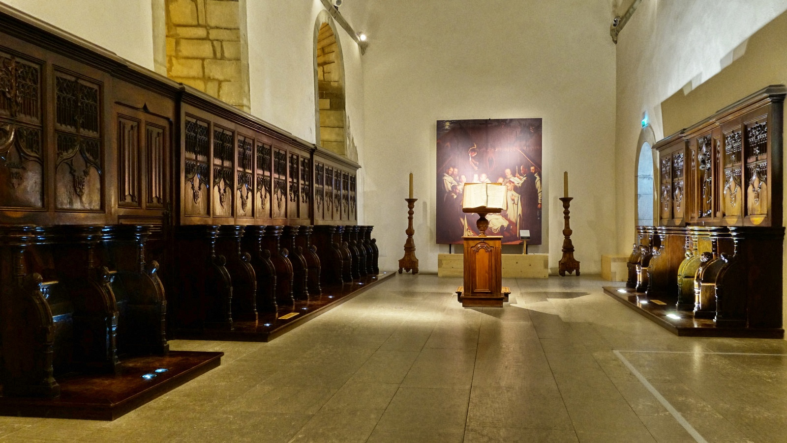 Musée de la Grande Chartreuse